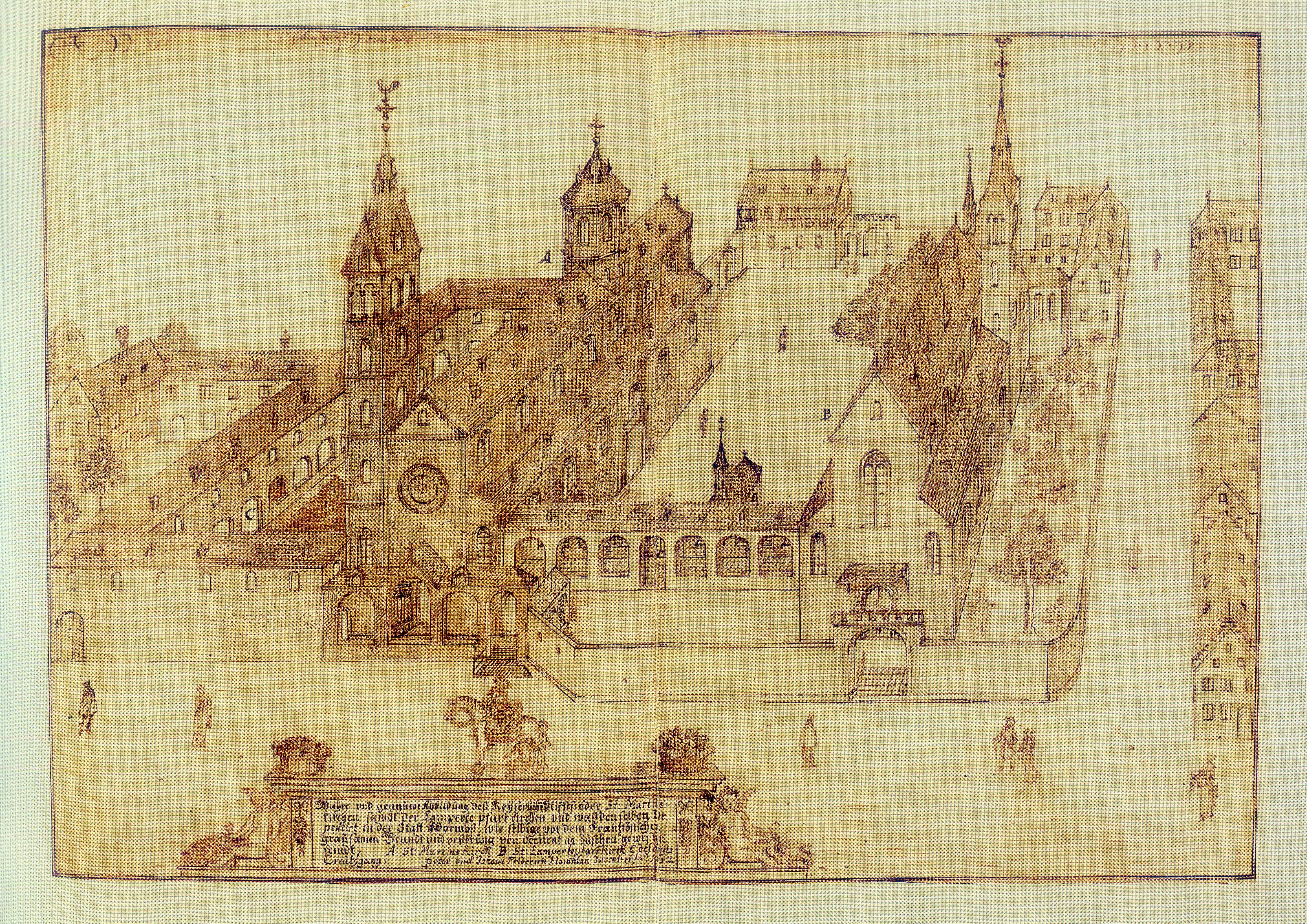 Stichzeichnung Kirche St. Martin und St. Lambertus